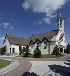 Kościół parafialny św. Józefa Robotnika we Wrzoskach